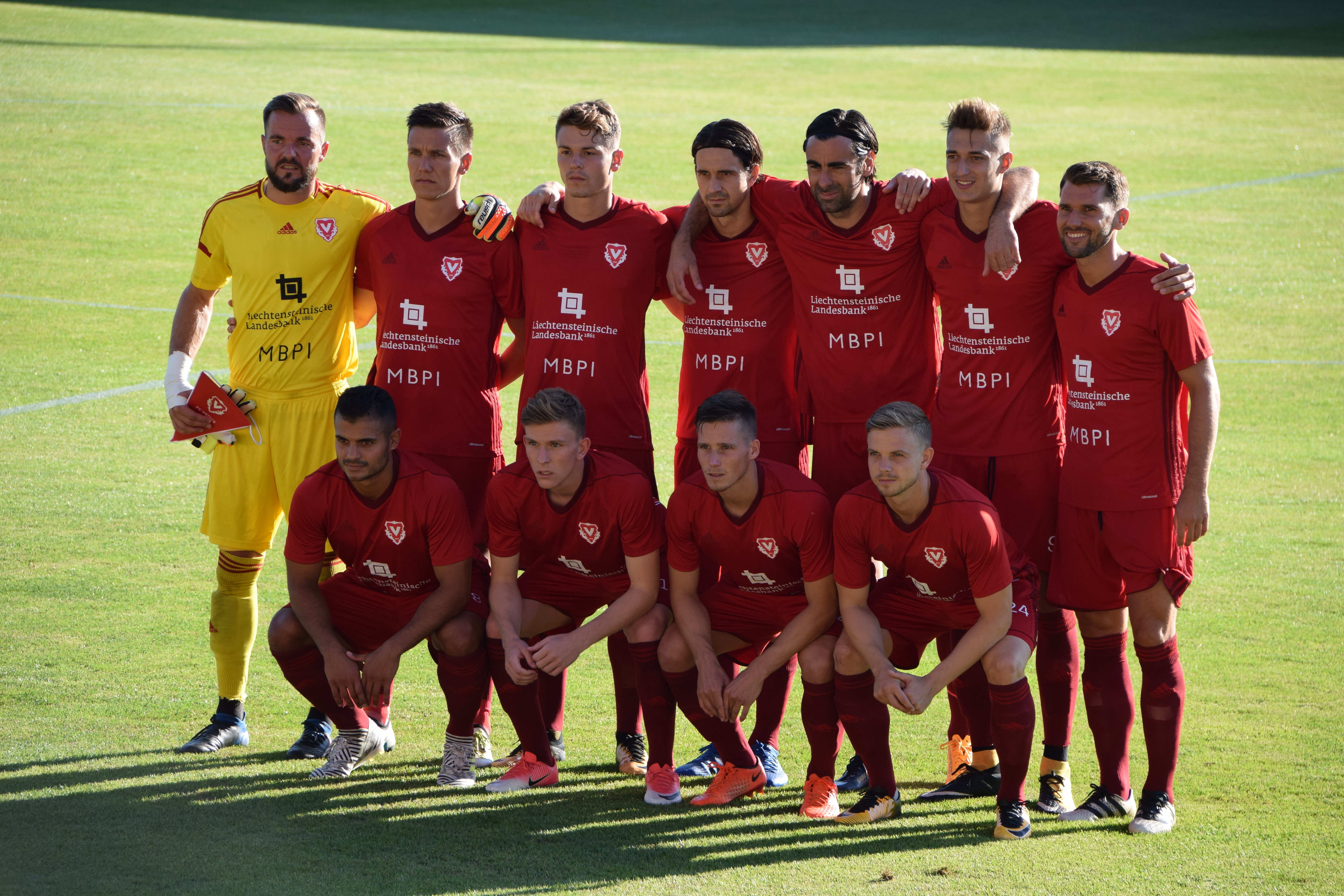 Mannschaftsaufstellung des FC Vaduz beim Rückspiel der 1. Qualifikationsrunde der UEFA Europa League 2016/17 gegen Bala Town am 6. Juli 2017.